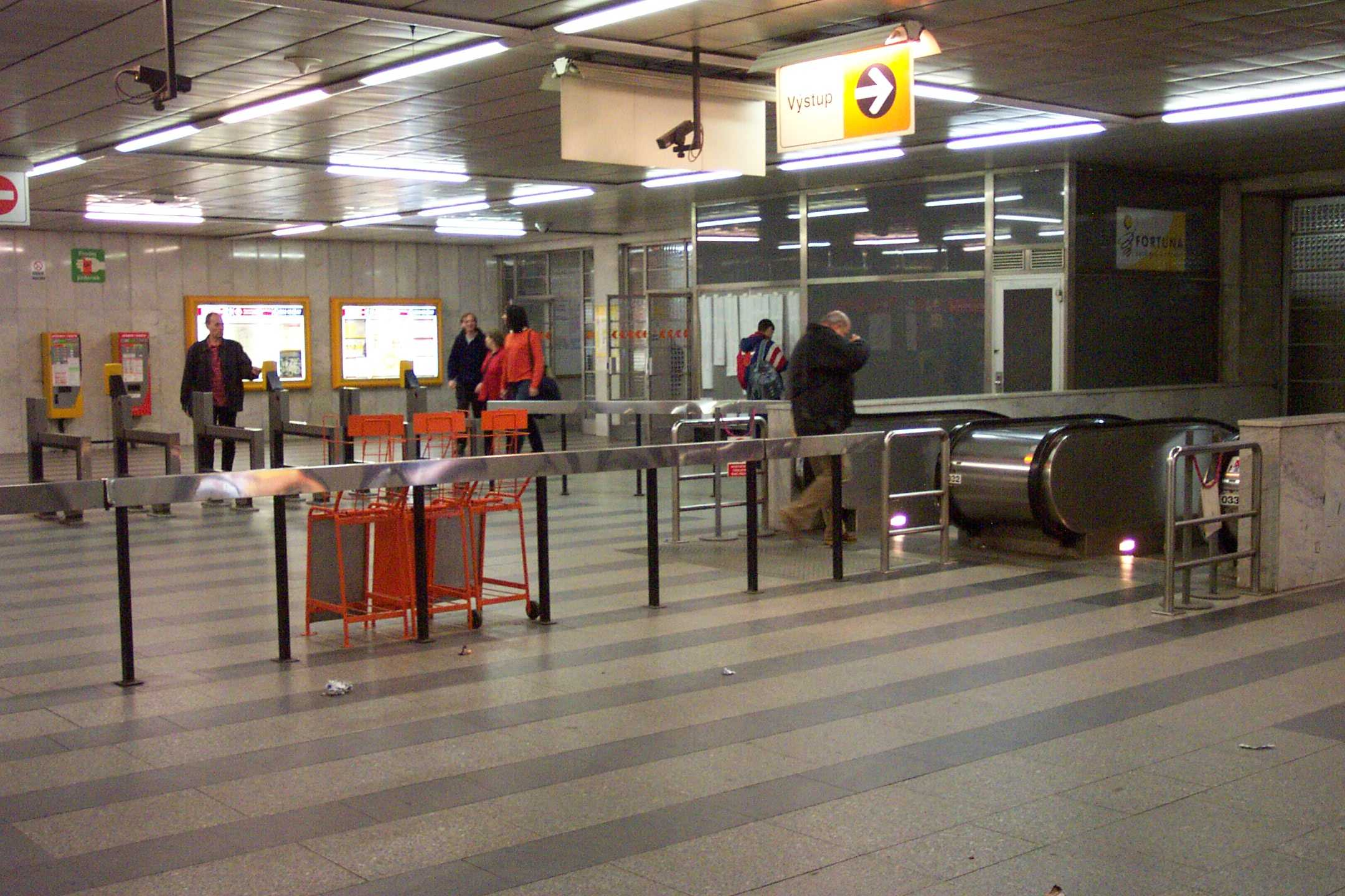 Metro station Pankrác, vestible - Stanice metra Pankrác, vestibul